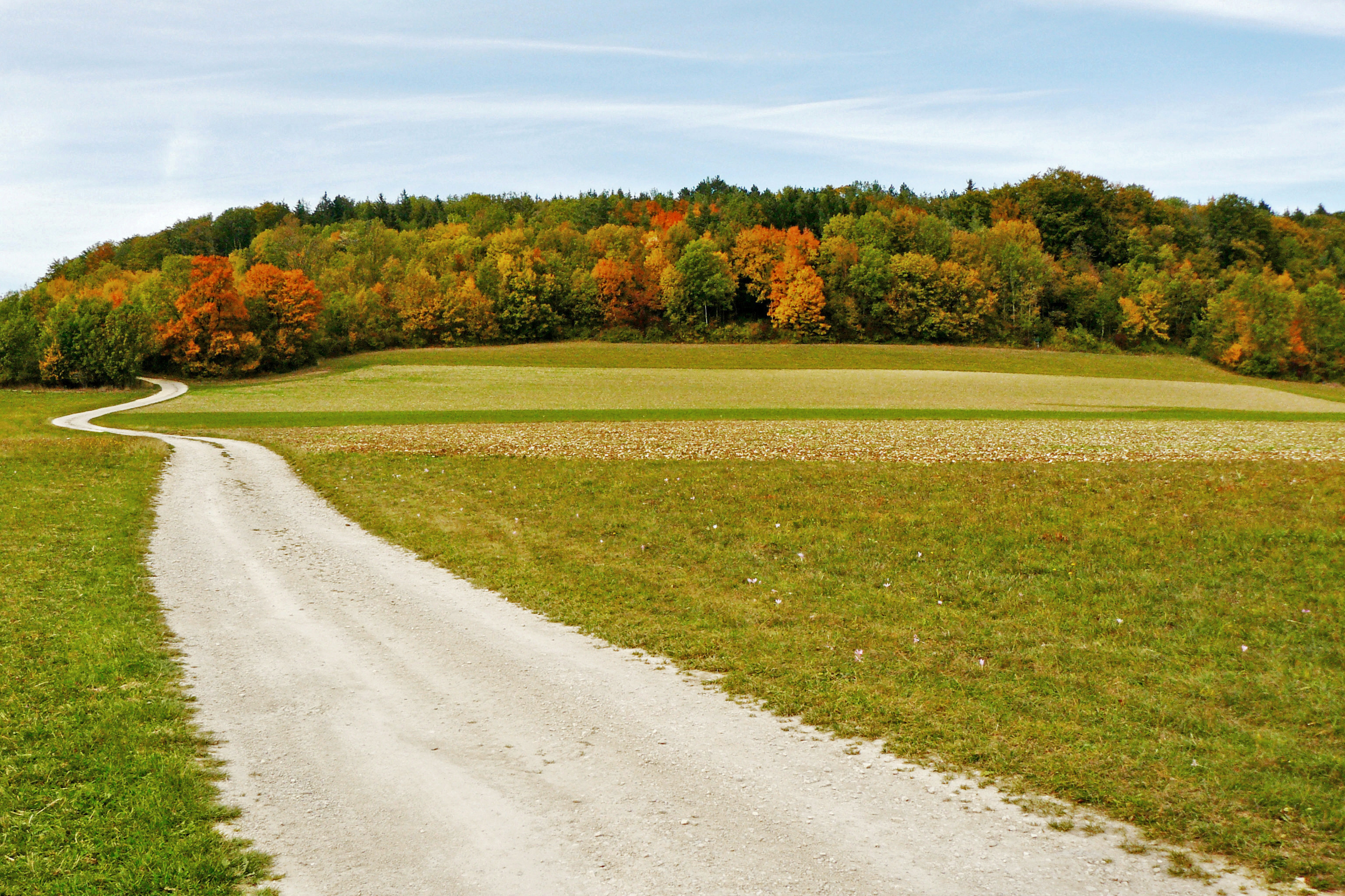 Kornberg bei Gruibingen